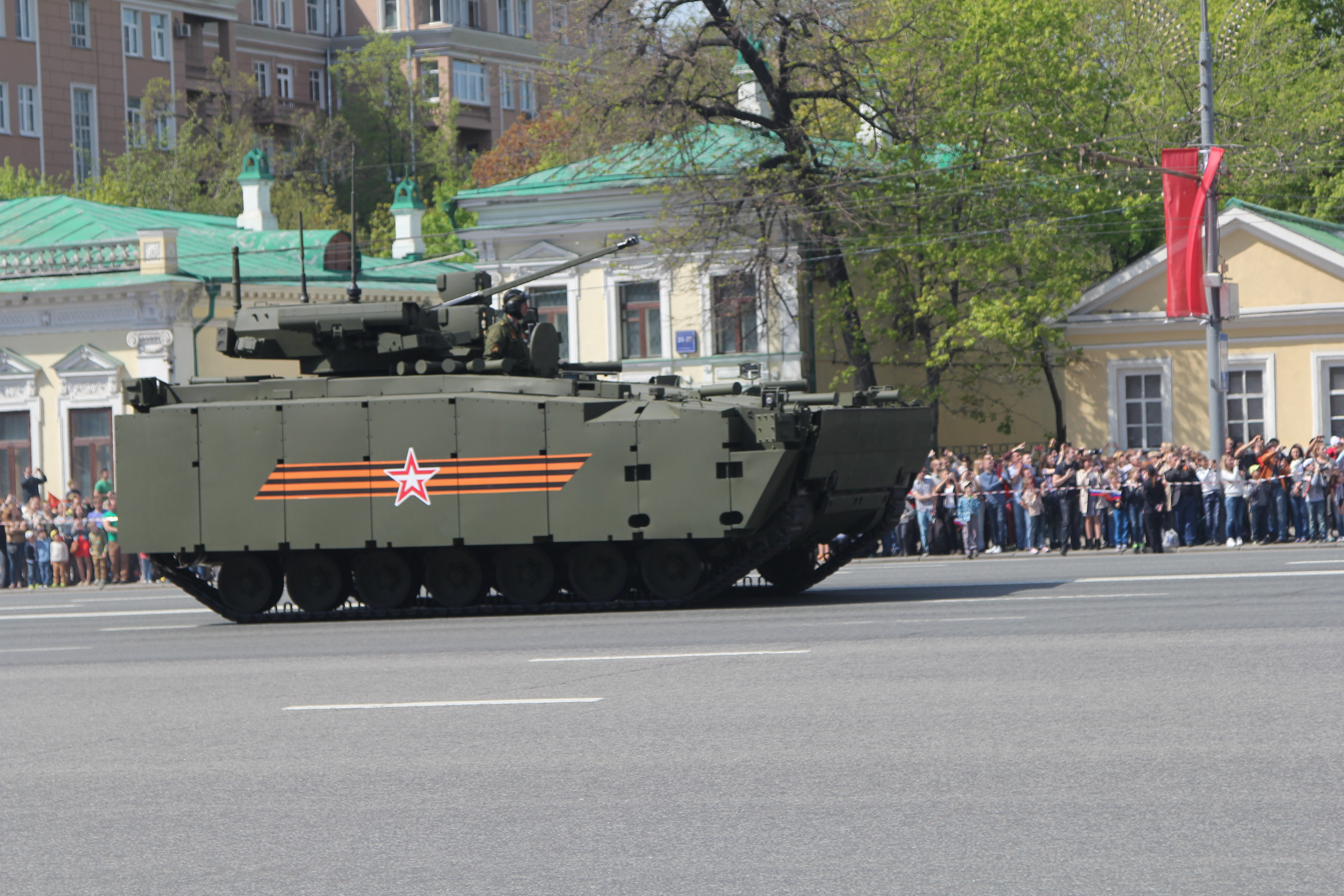 БМП Курганец-25 с альтернативным комплексом вооружения